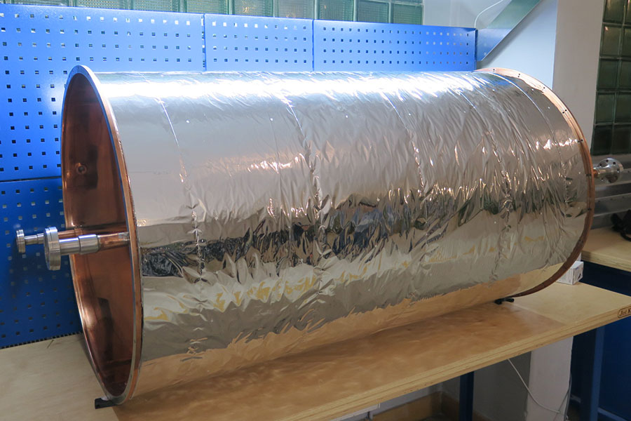 Instalacja kriogeniczna, zaizolowana kocem MLI.